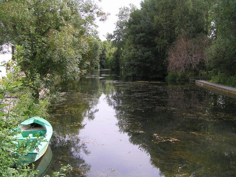 L'Antenne à Javrezac (Charente, France).